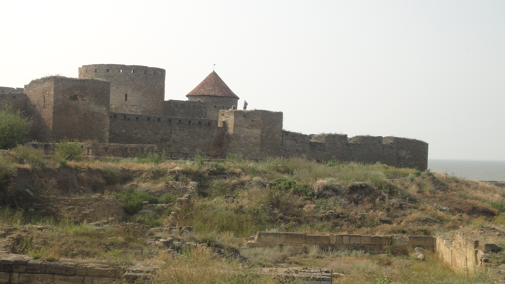 Один из видов Белгород-Днестровской крепости (Аккерманской)(Украина)